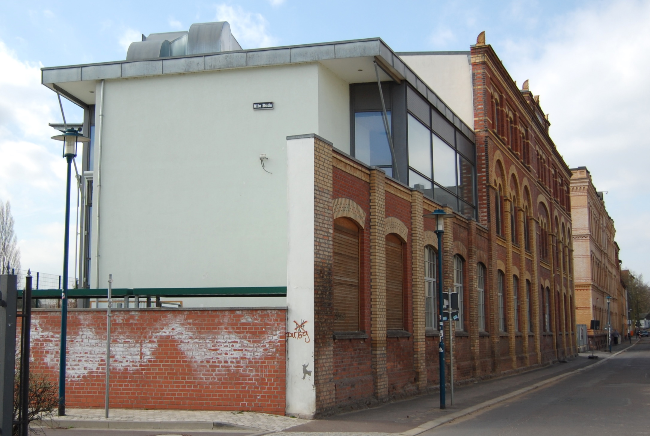 Gebäude der Firma Rudolf Wolf in der Karl-Schmidt-Straße in Magdeburg-Buckau